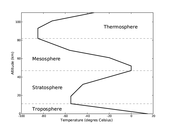 Profil vertical de température dans l'atmosphère.